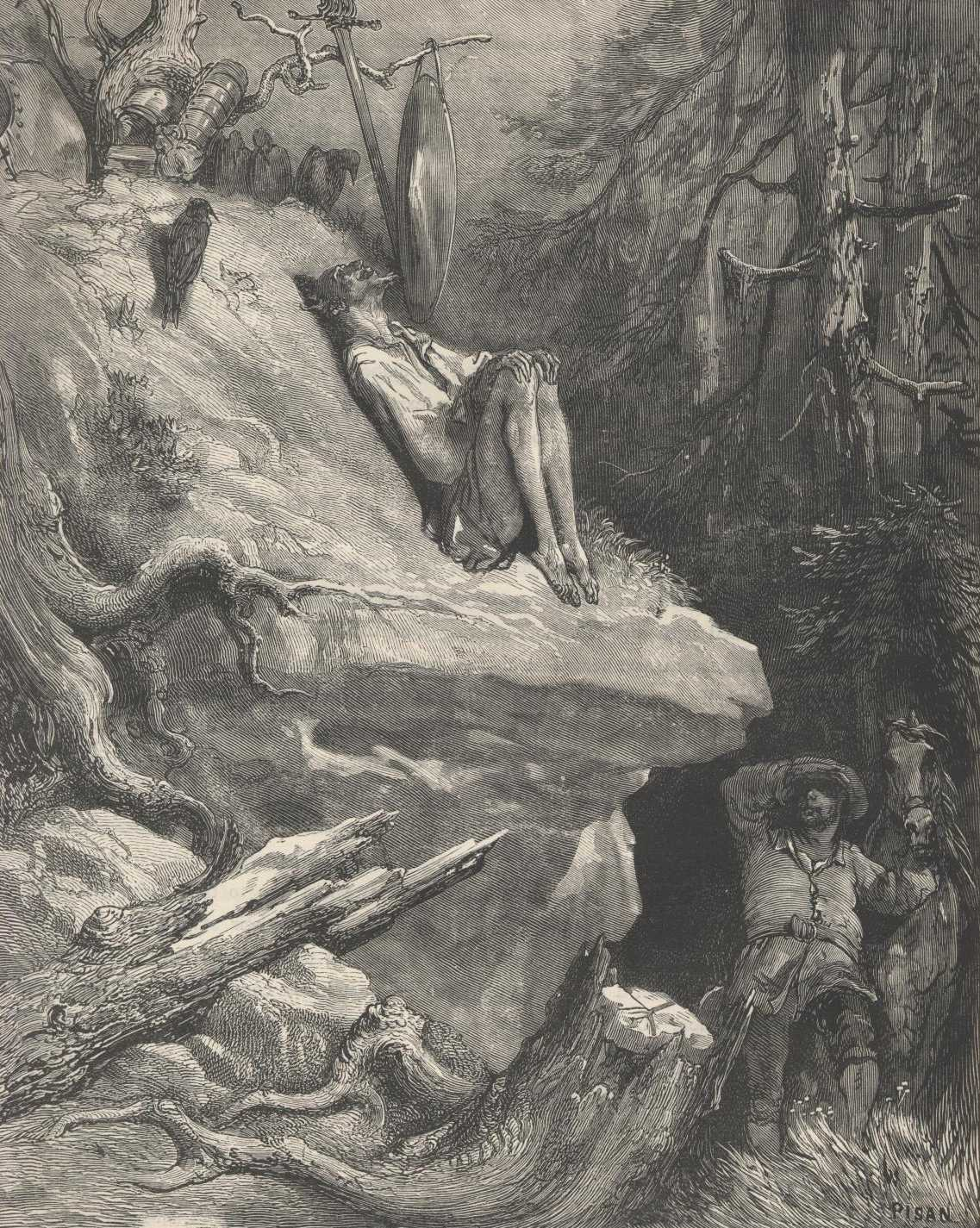 Ilustração de Gustave Doré para a edição de 1863 de "Dom Quixote" de Miguel de Cervantes